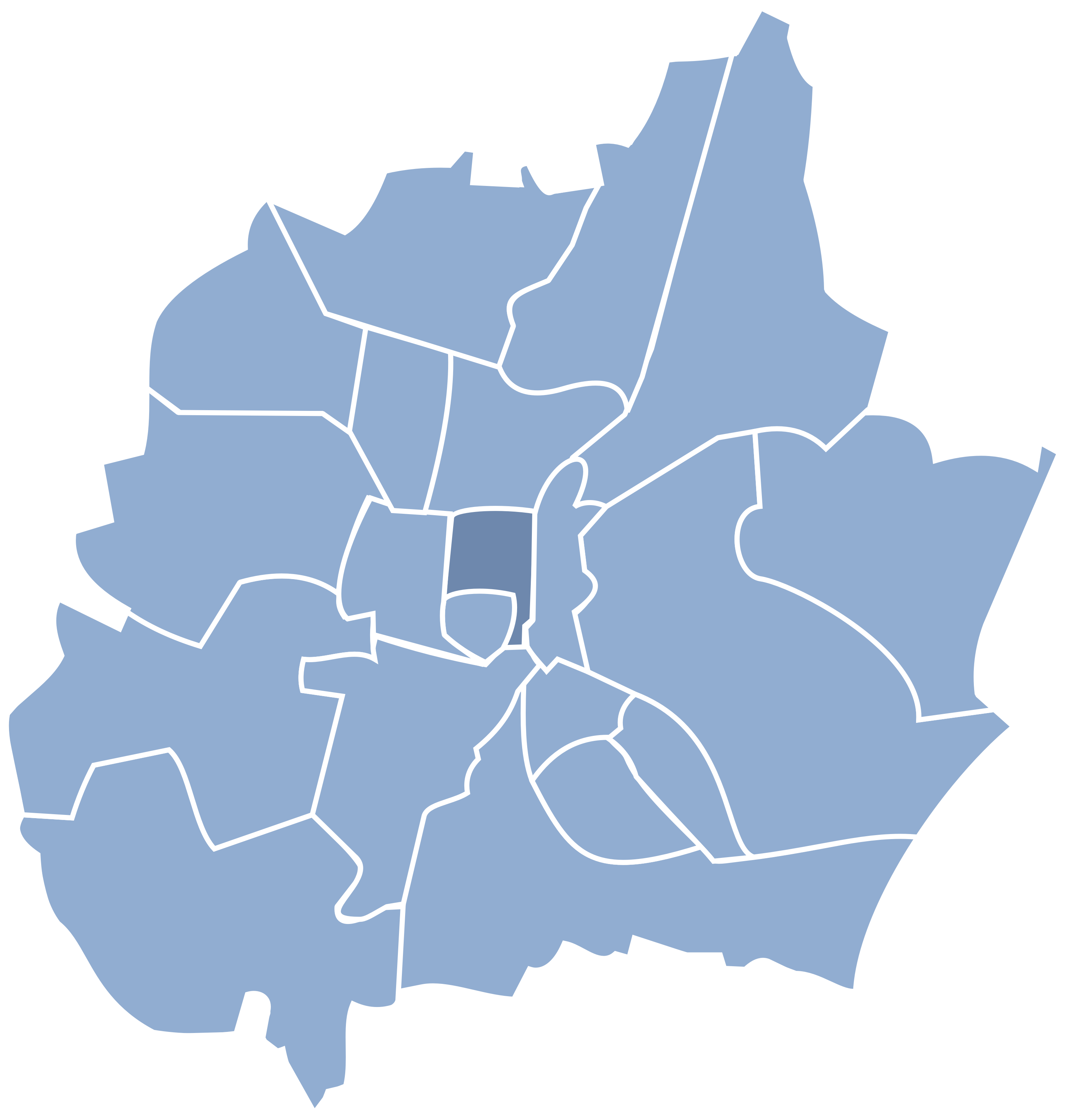 Śródmieście na tle dzielnic Częstochowy.